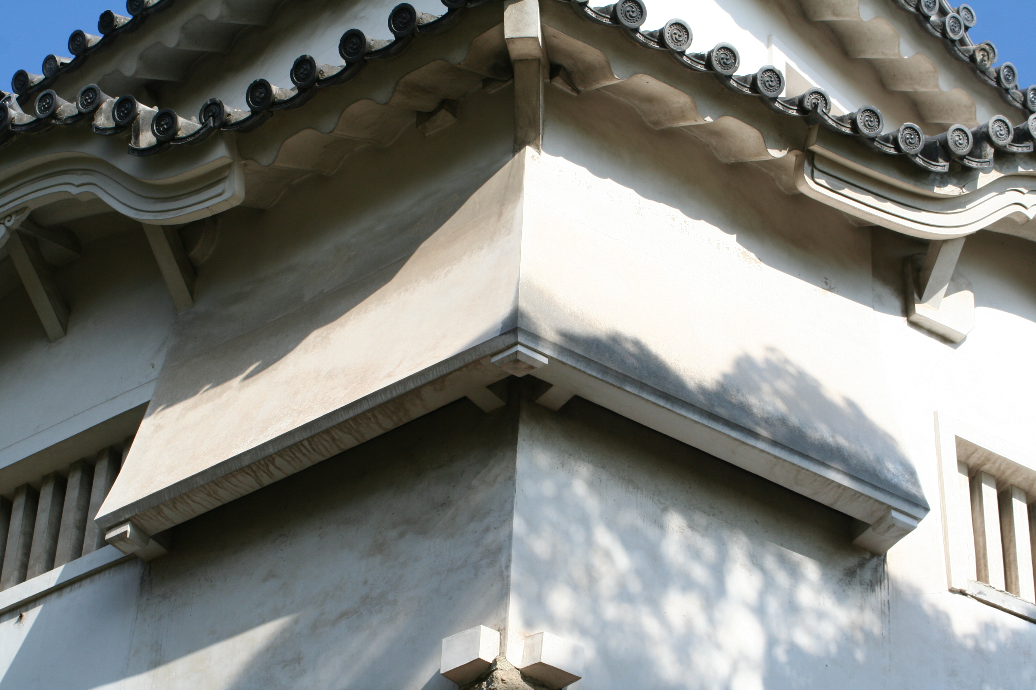 2009年秋の姫路城。 ロの櫓の石落とし。